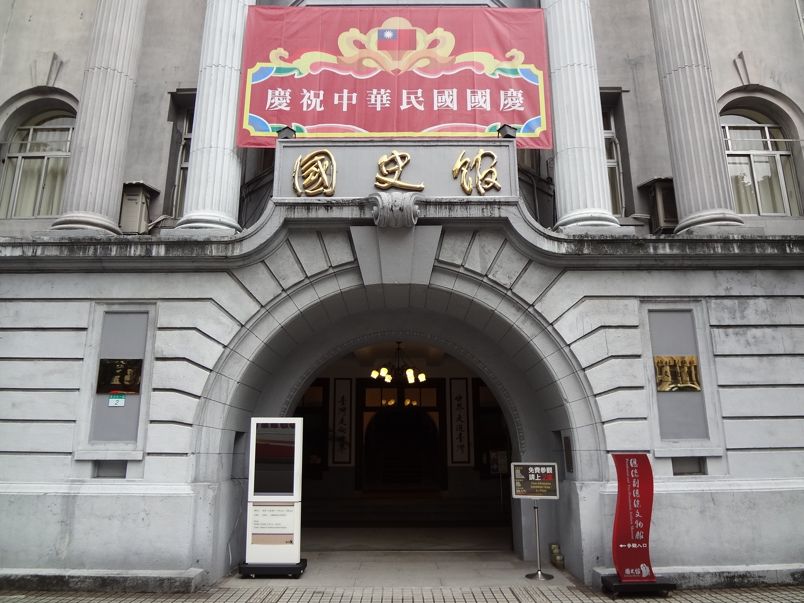 中華民國國史館慶祝中華民國102年國慶，大門右側設置總統副總統文物館參觀入口標示牌。